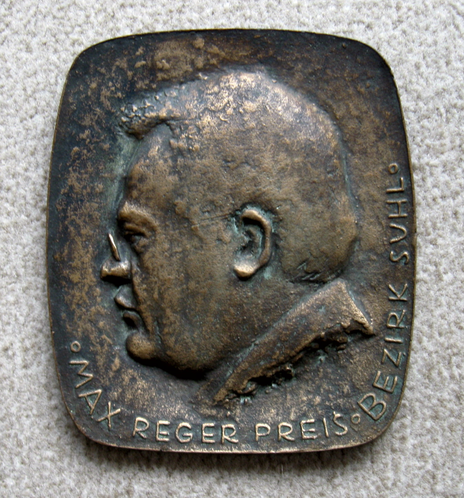 Medaille zum Max-Reger-Preis des Bezirkes Suhl in der DDR, verliehen am 7. Oktober 1975 an Kammersänger Günther Hofmann (siehe auch die dazugehörige Urkunde Datei: Urkunde zum Max-Reger-Preis.jpg). Größe ca. 9 cm x 12 cm.